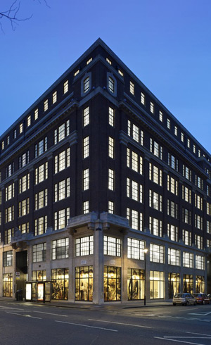 Horseferry House, London